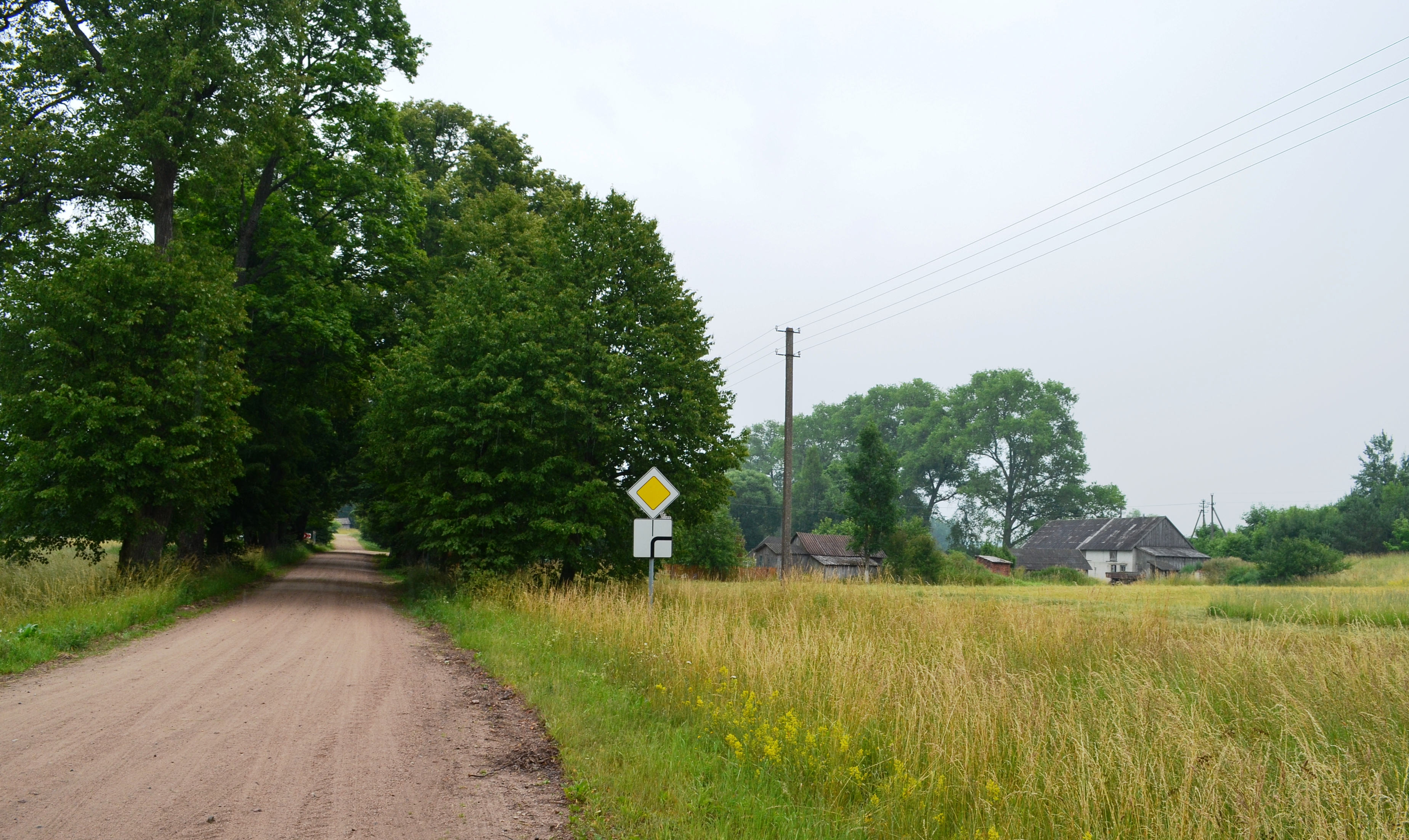 Šereitlaukis, Pagėgių sav.